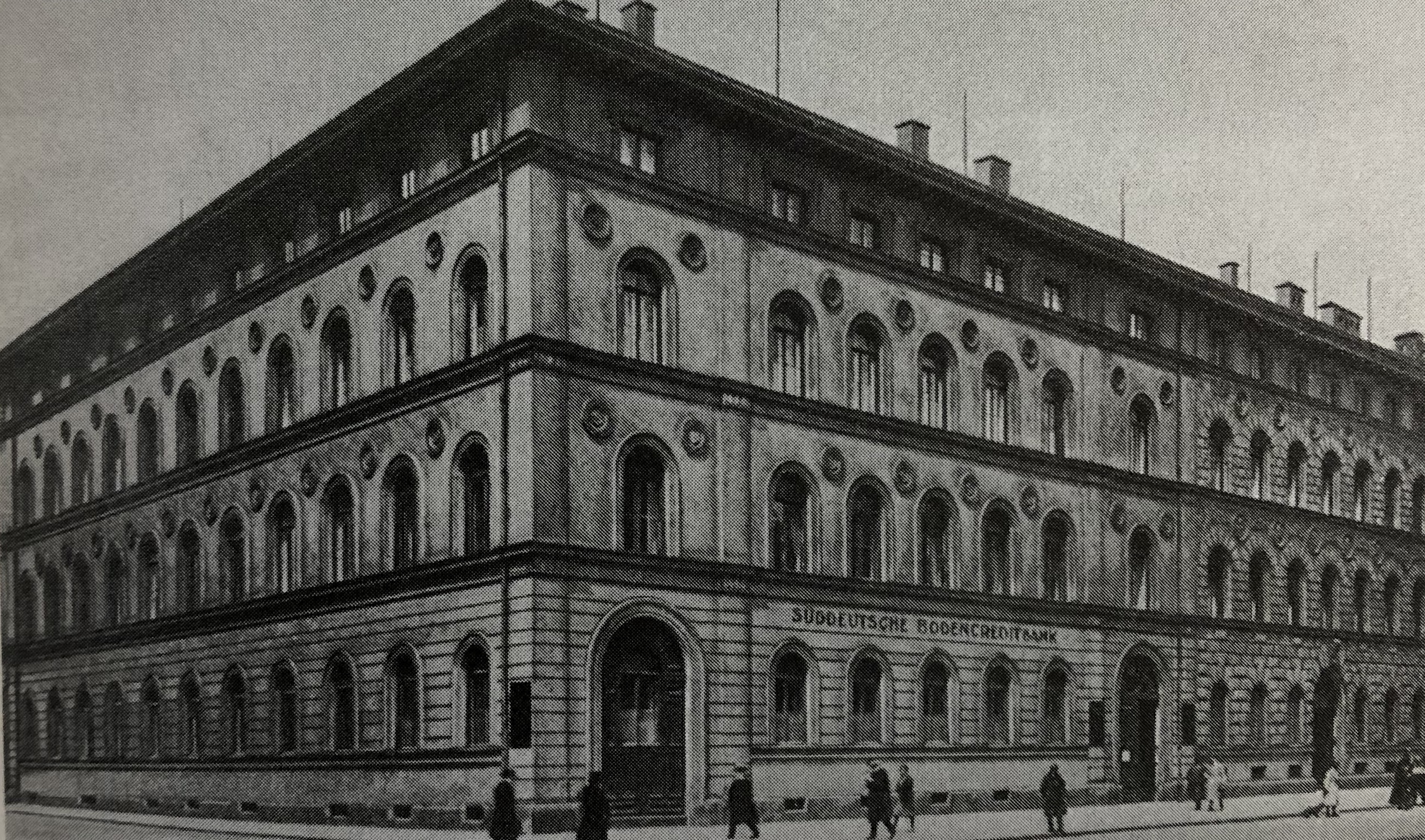 Ludwigstraße, München